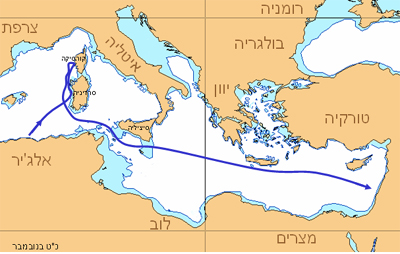 מסלול ההפלגה של אוניית המעפילים כ"ט בנובמבר